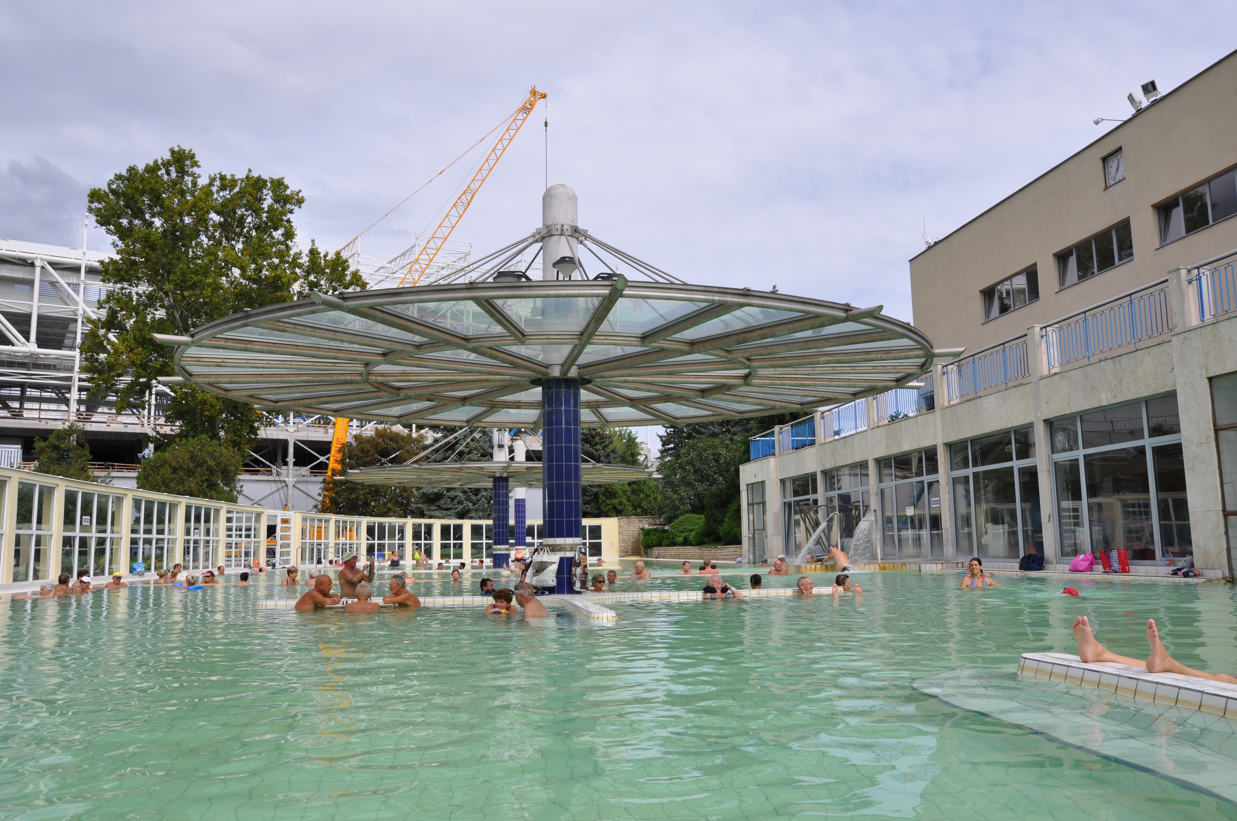 Budapest, Dagály fürdő